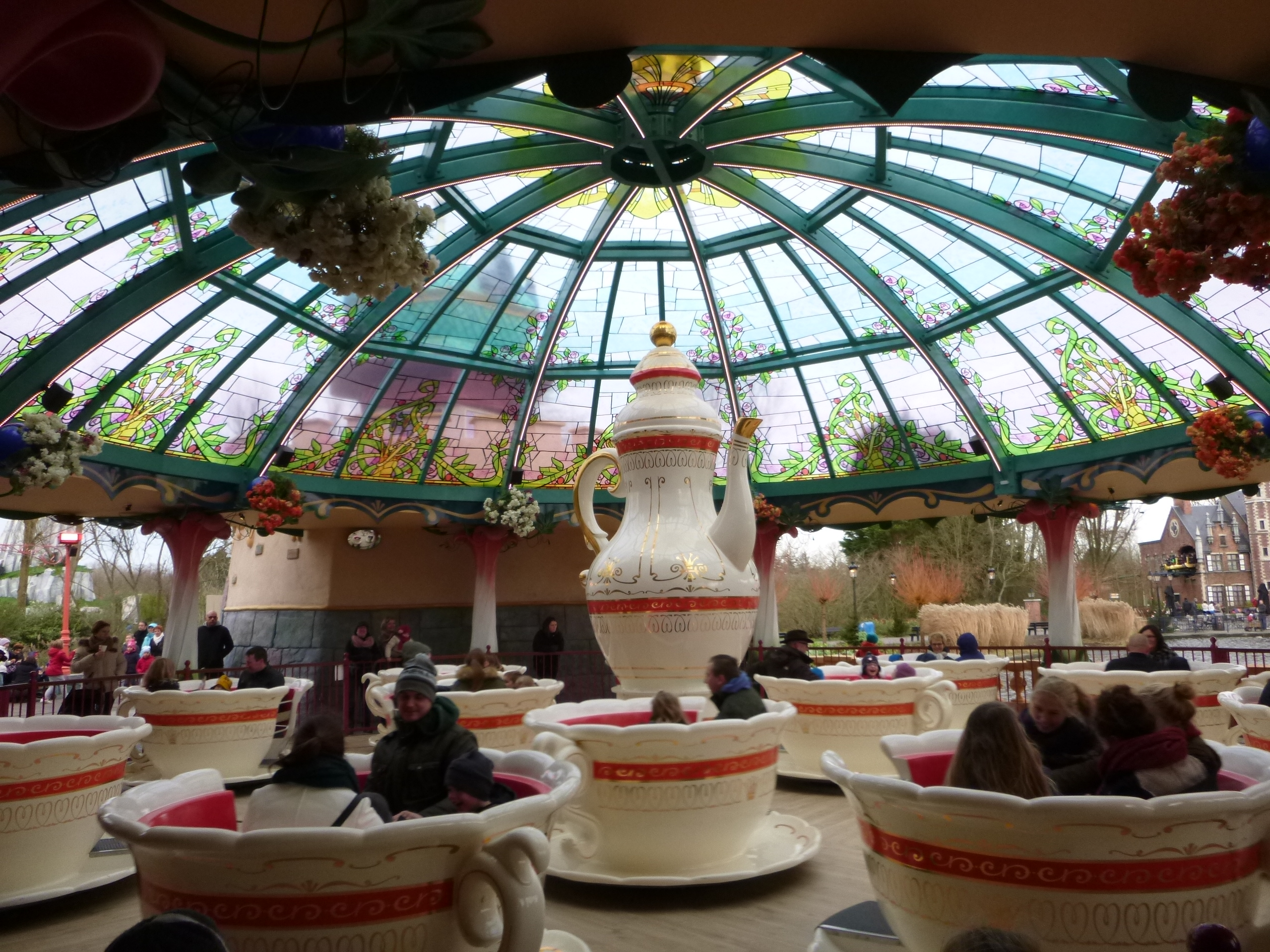 Tasses à café à Plopsaland